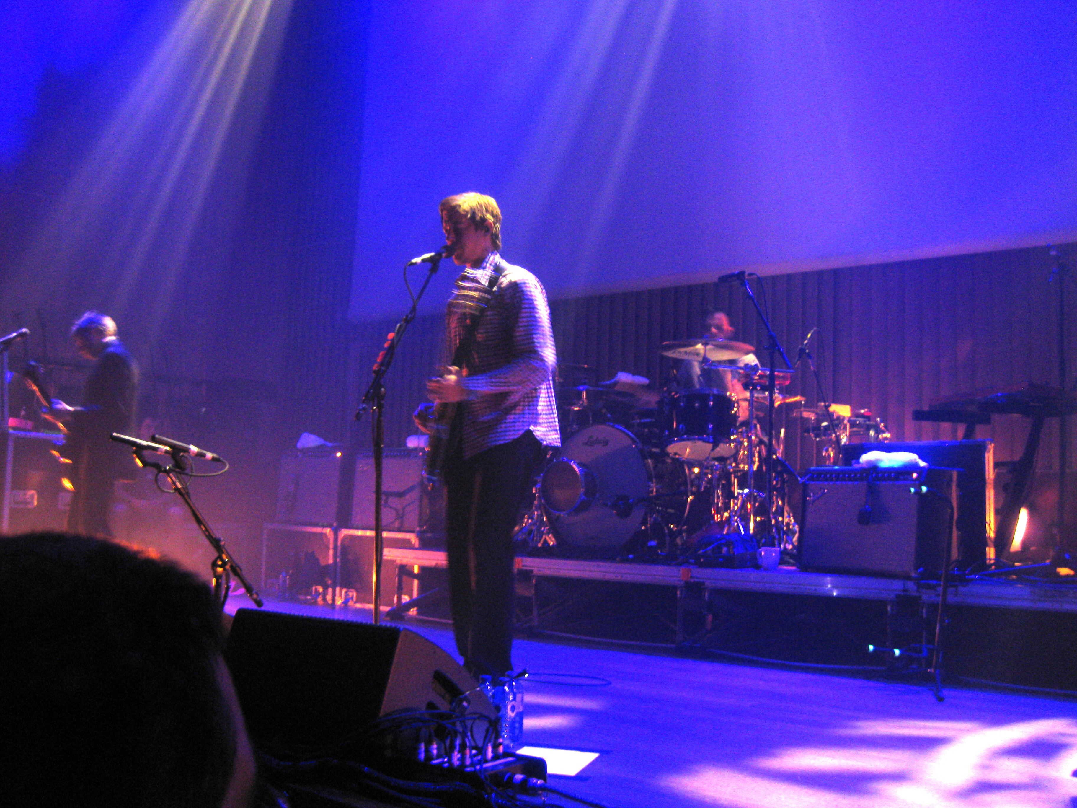 Interpol ao vivo na sala Capitol de Santiago de Compostela.